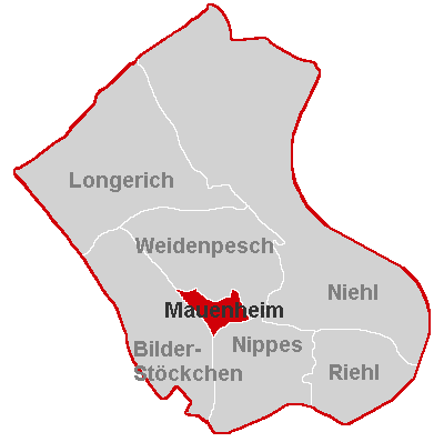 Lagekarte Mauenheim im Stadtbezirk Köln-Nippes